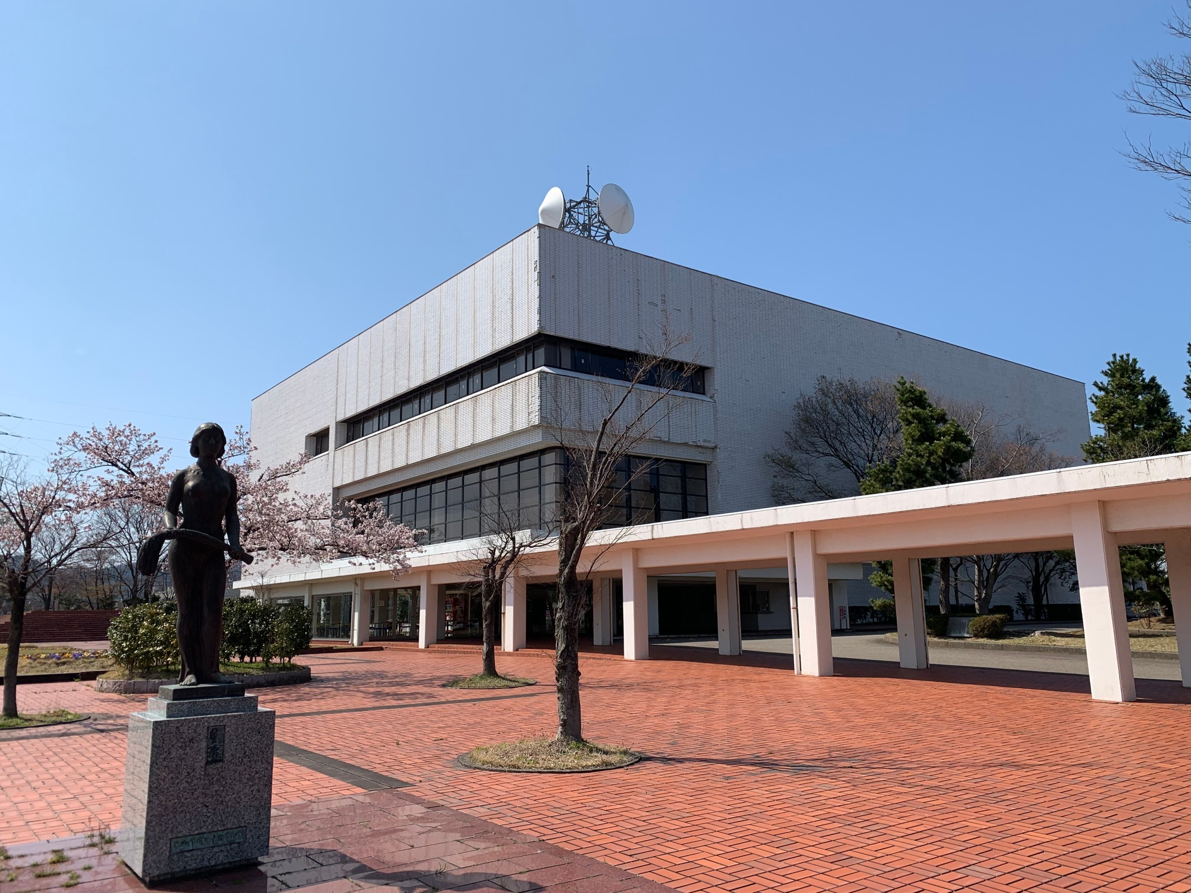 上越文化会館（2020年4月）